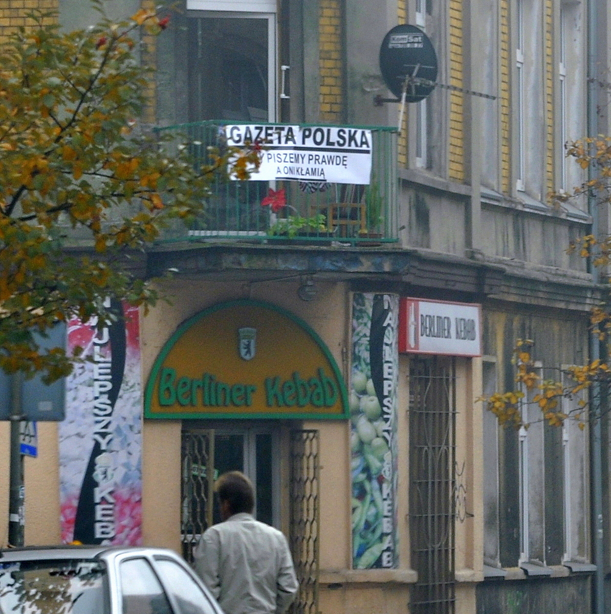 Gorzów Wlkp., ul. Armii Polskiej. Na balustradzie balkonu napis "My piszemy prawdę a oni kłamią" propagujący prawicowy tygodnik "Gazeta Polska". Poniżej, wejście do lokalu z tureckimi potrawami.